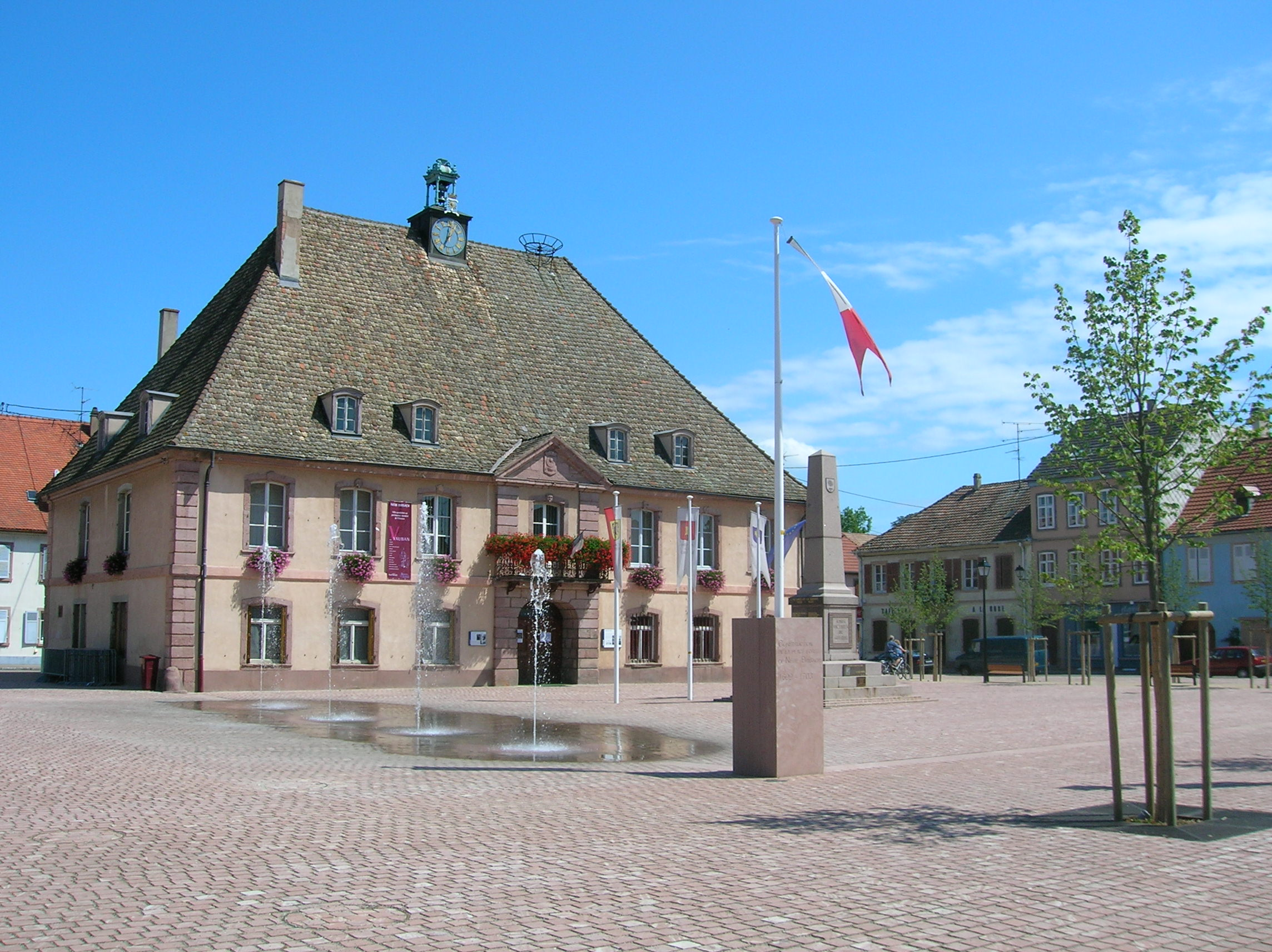 Mairie de Neuf-Brisach, dans le Haut-Rhin